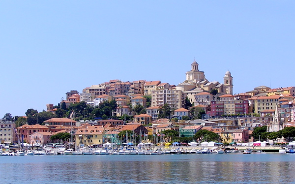 Imperia. Porto Maurizio, Italy